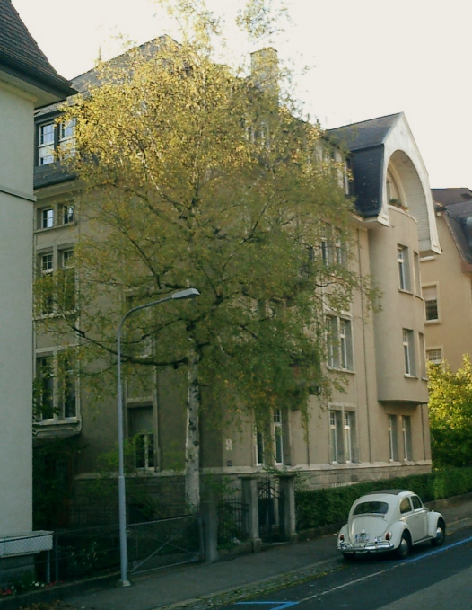 Mit Albert Einsteins Nobelpreisgeld hat Mileva Einstein-Maric dieses Haus an der Huttenstrasse 62 in Zürich gekauft, Eigenaufnahme von Mgloor